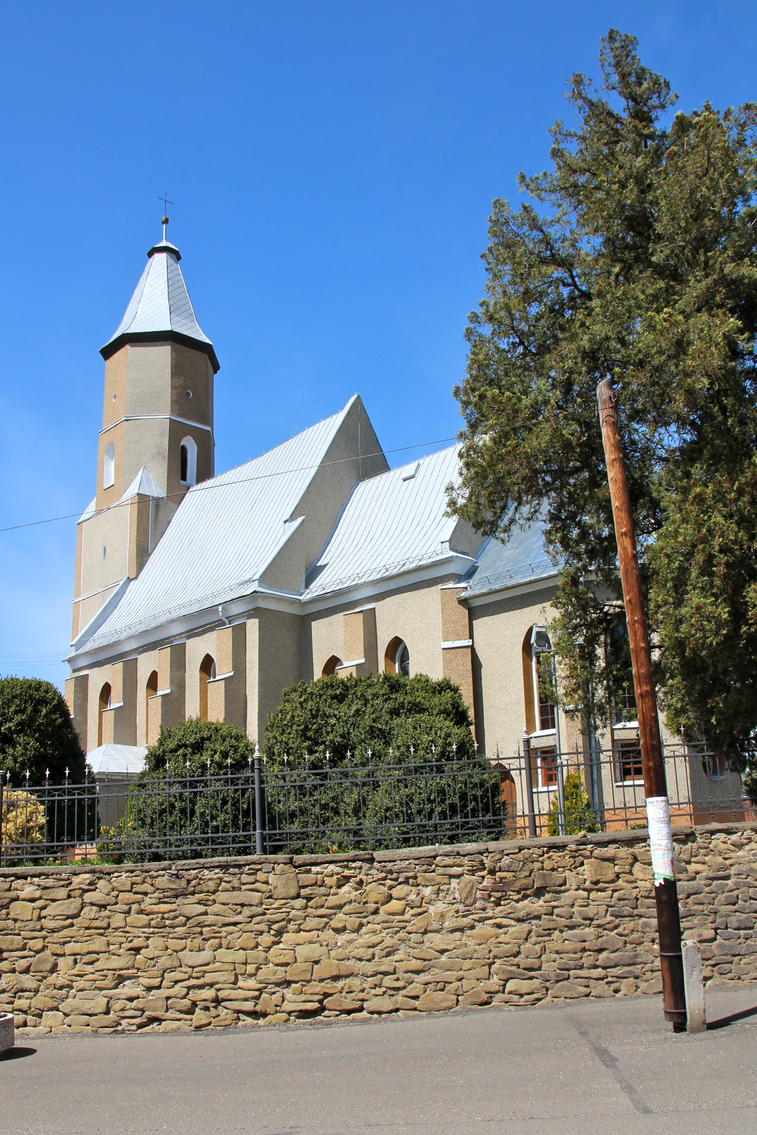 Bliszczyce - kościół parafialny p.w. św. Katarzyny, k. XVII, 1672, 1906 (zabytek nr 49 (97/48) z 25.11.1948).